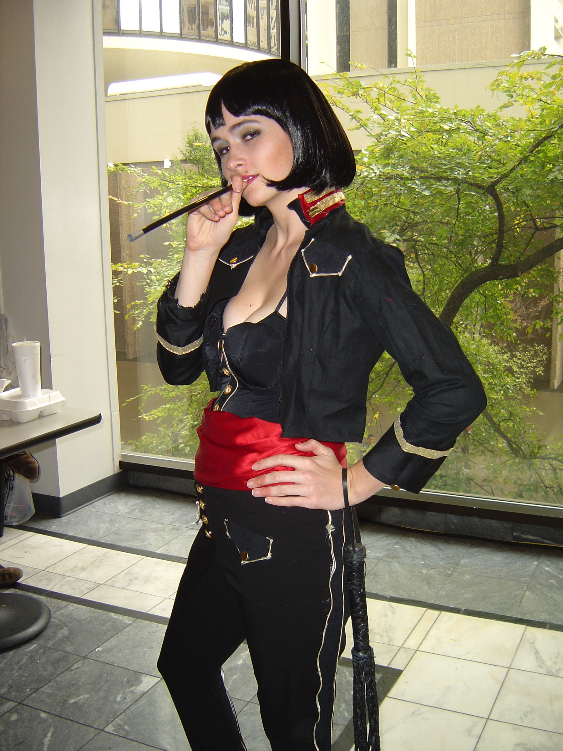 Cosplay at Dragon*Con 2009.